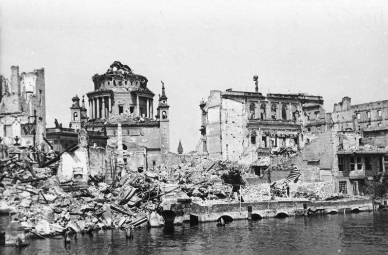 Zentralbild 5.10.1963 Das im II. Weltkrieg zerstörte Potsdam. Aufnahme 1947 UBz.: einen Blick von der Langen Brücke auf die Nicolai-Kirche